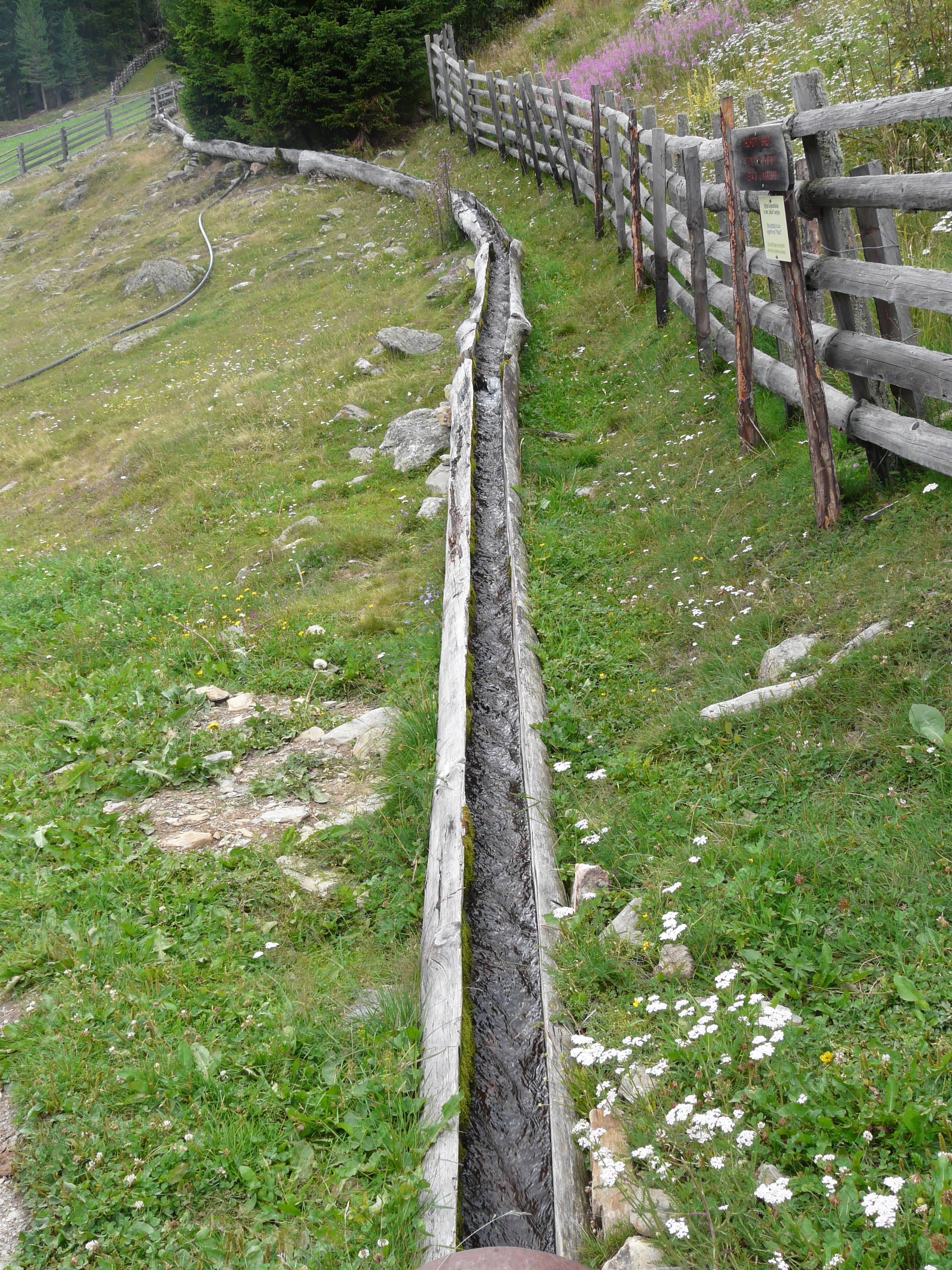 Holzrinnenwaal oberhalb vom Hof Greit, Martelltal